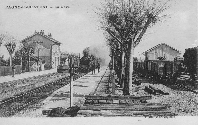 La gare vers 1900.